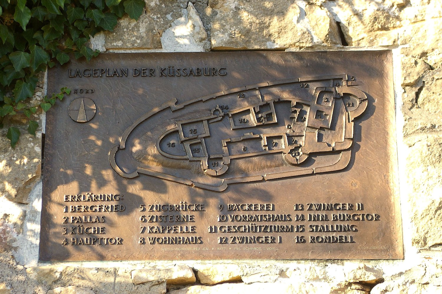 Küssaburg Plan